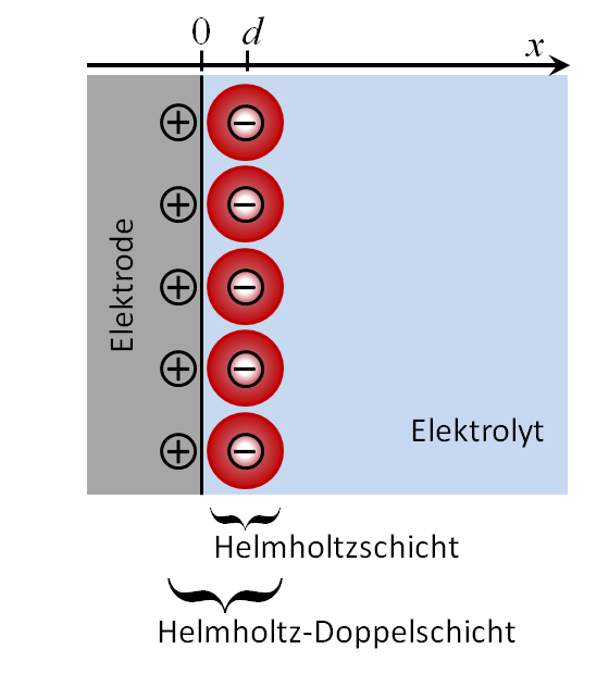 Schema einer Helmholtz-Doppelschicht mit positiv geladener Elektrode und Anionenschicht.